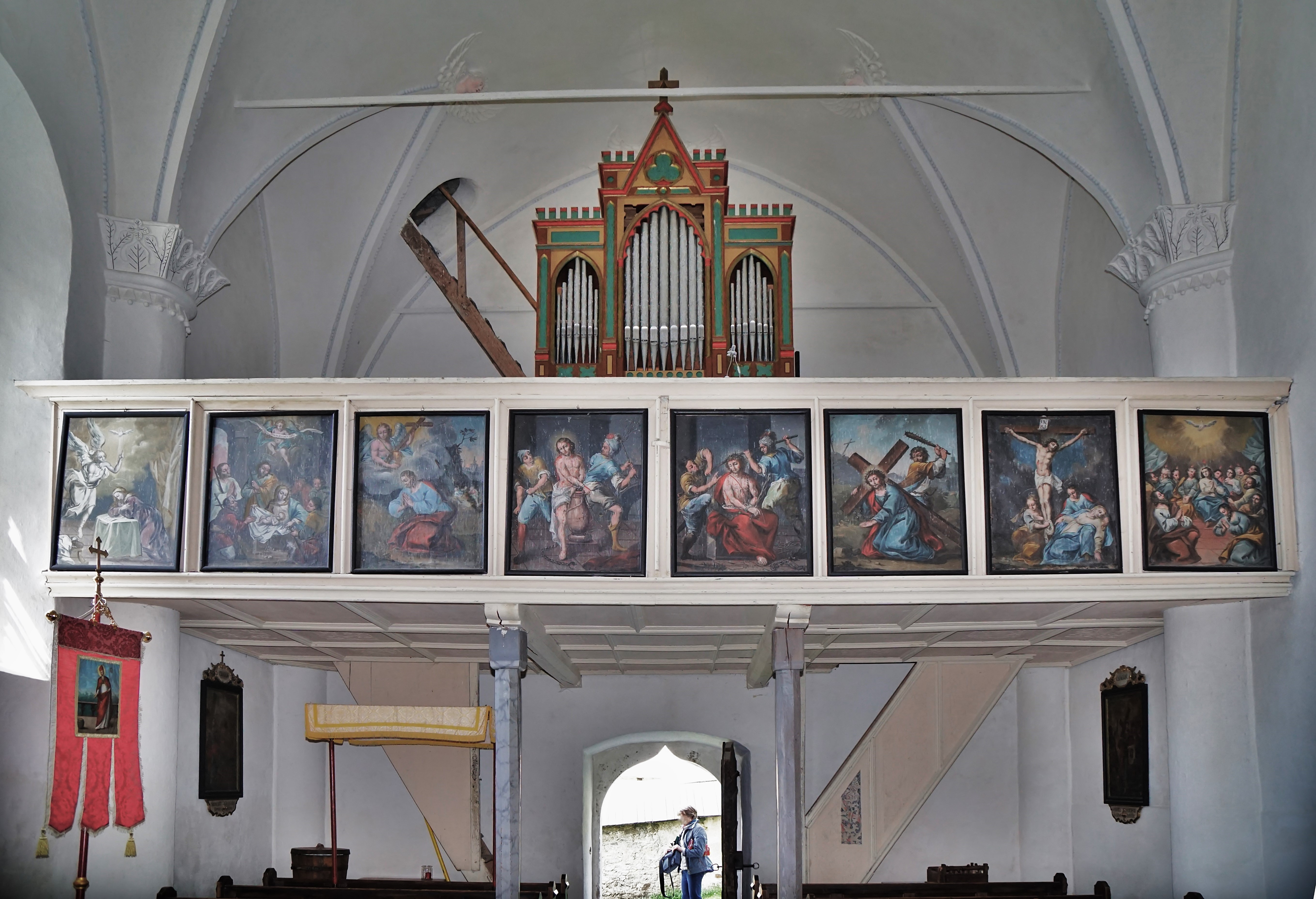 Kath. Pfarrkirche Hll. Rupert und Virgil, Außerteuchen (Himmelberg, Kärnten), die Orgelempore